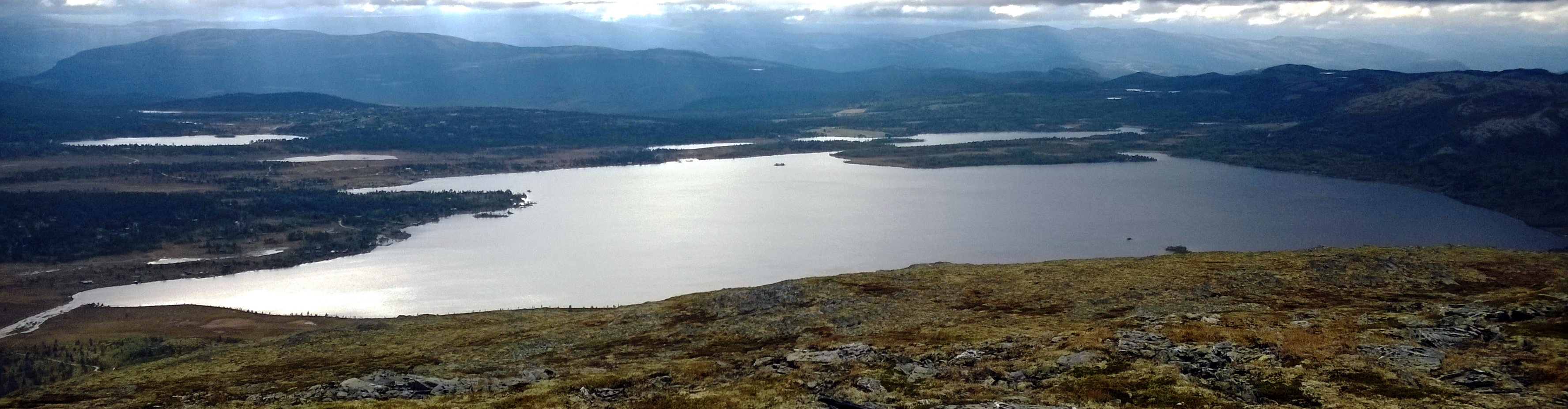 Furusjøen i Nord Fron og Sel kommune ved Rondane.